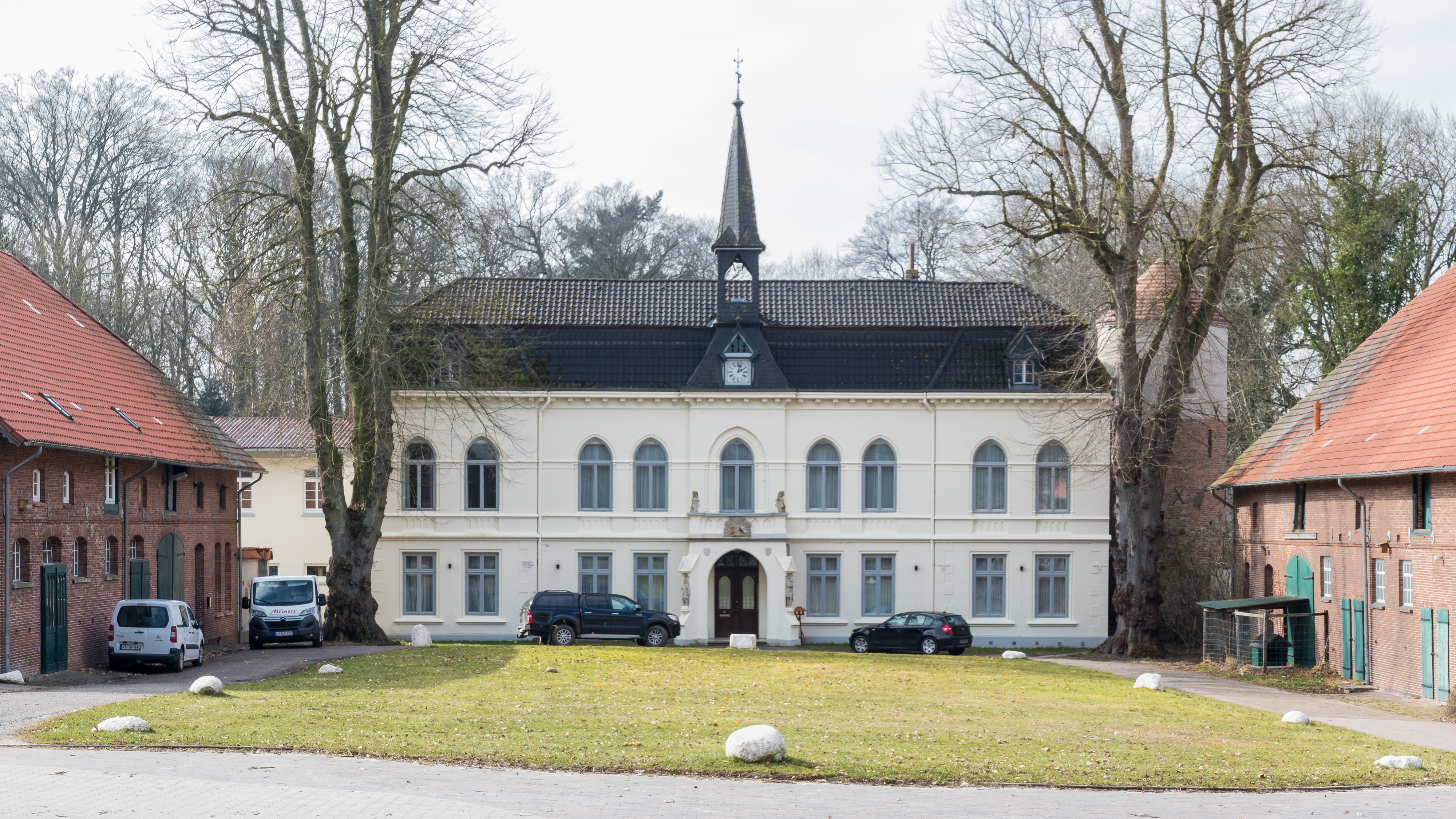 Gut Loy, Rastede